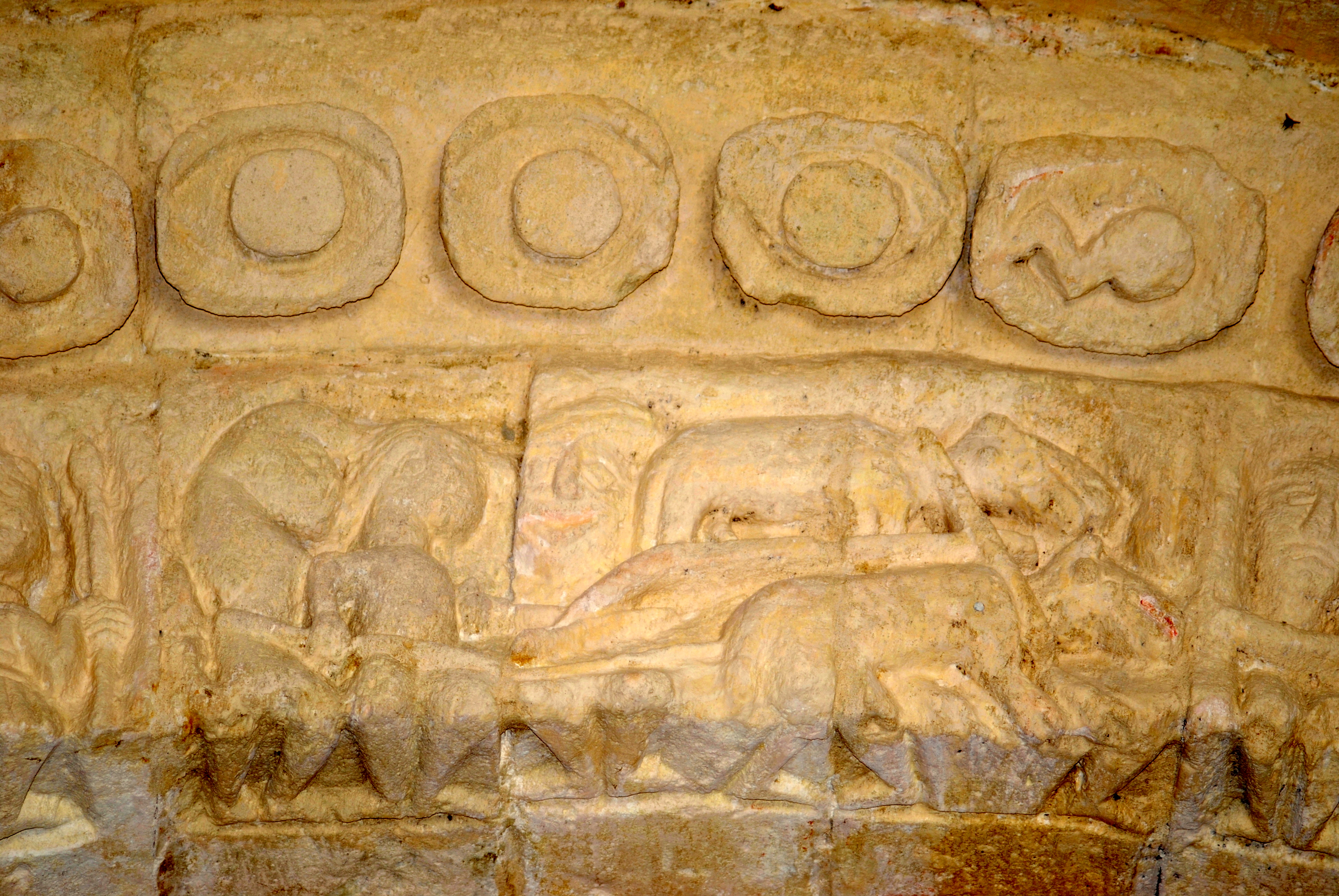 Pompignac église St Martin